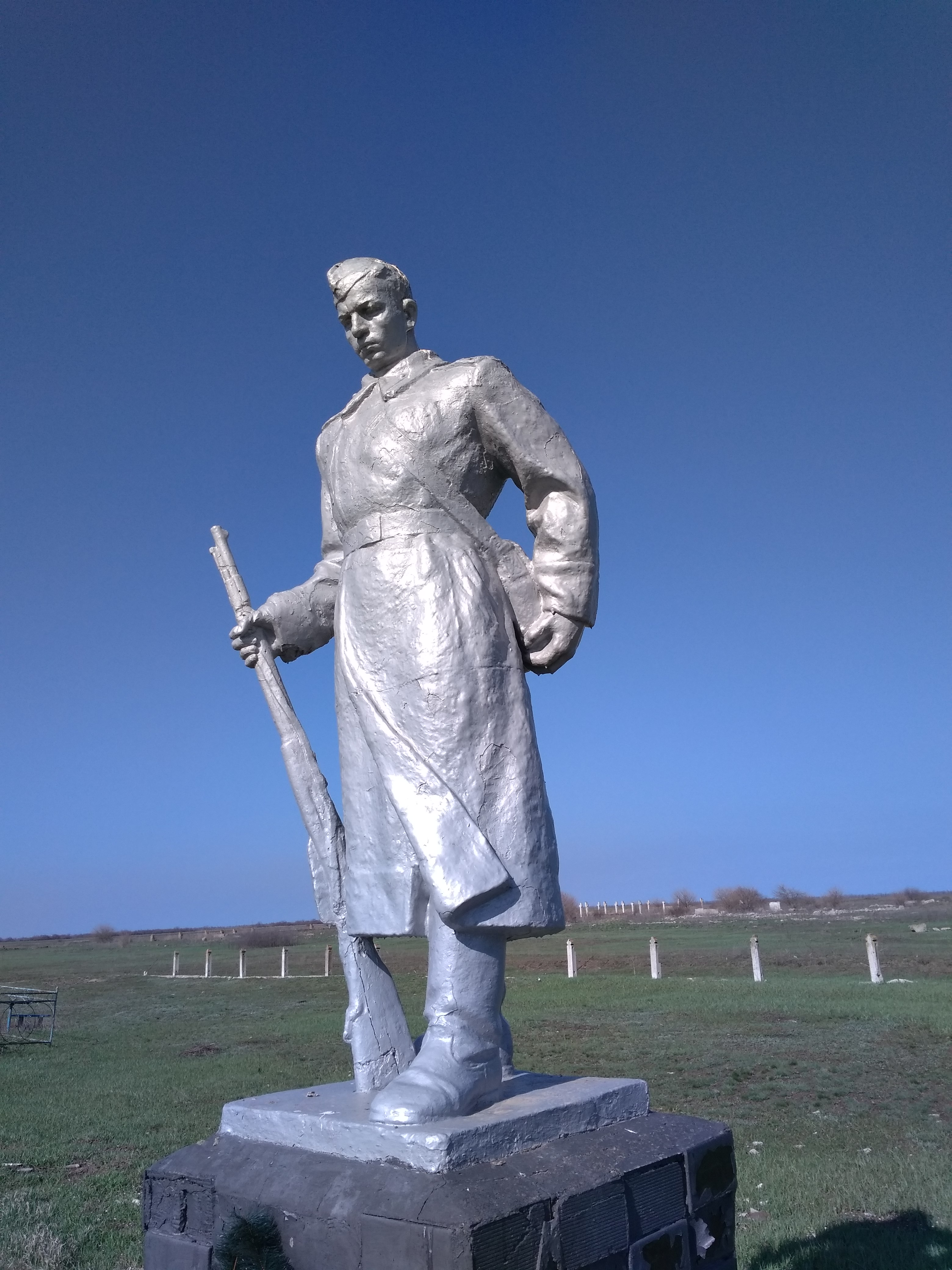 Памятник солдату Второй мировой войны в селе Косаковка. Апрель 2018 г.